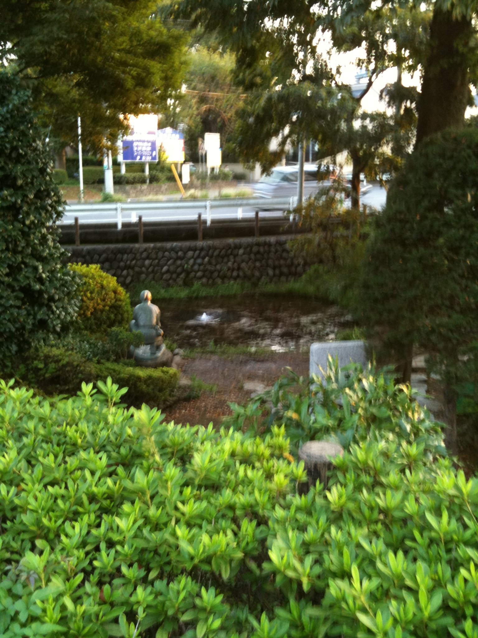 子和清水（松戸市常盤平）2010年。